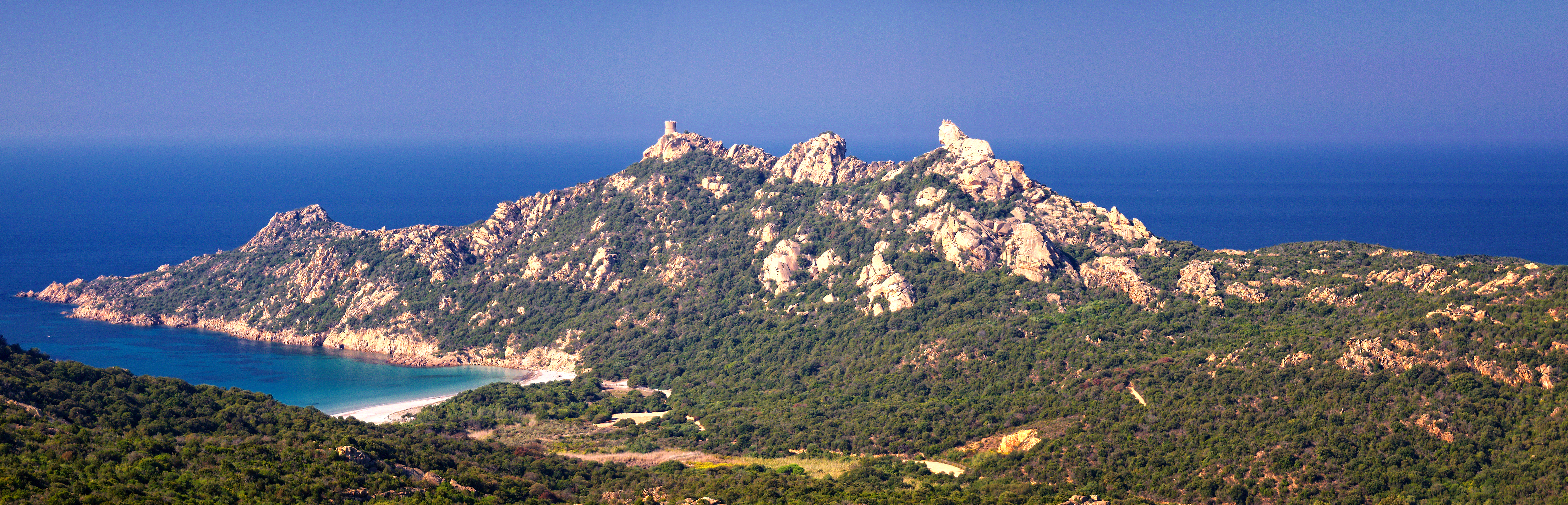 Sartène (Corse) - Panorama de Roccapina (Cala di Roccapina, la tour génoise et le Lion de Roccapina) depuis Bocca di Roccapina sur la RN 196